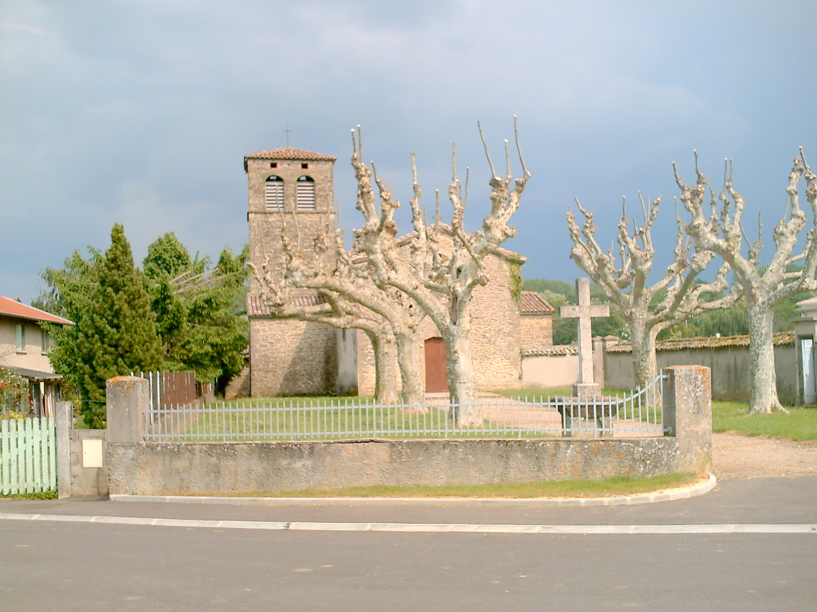 Serpaize (Isère, France) - L'église.